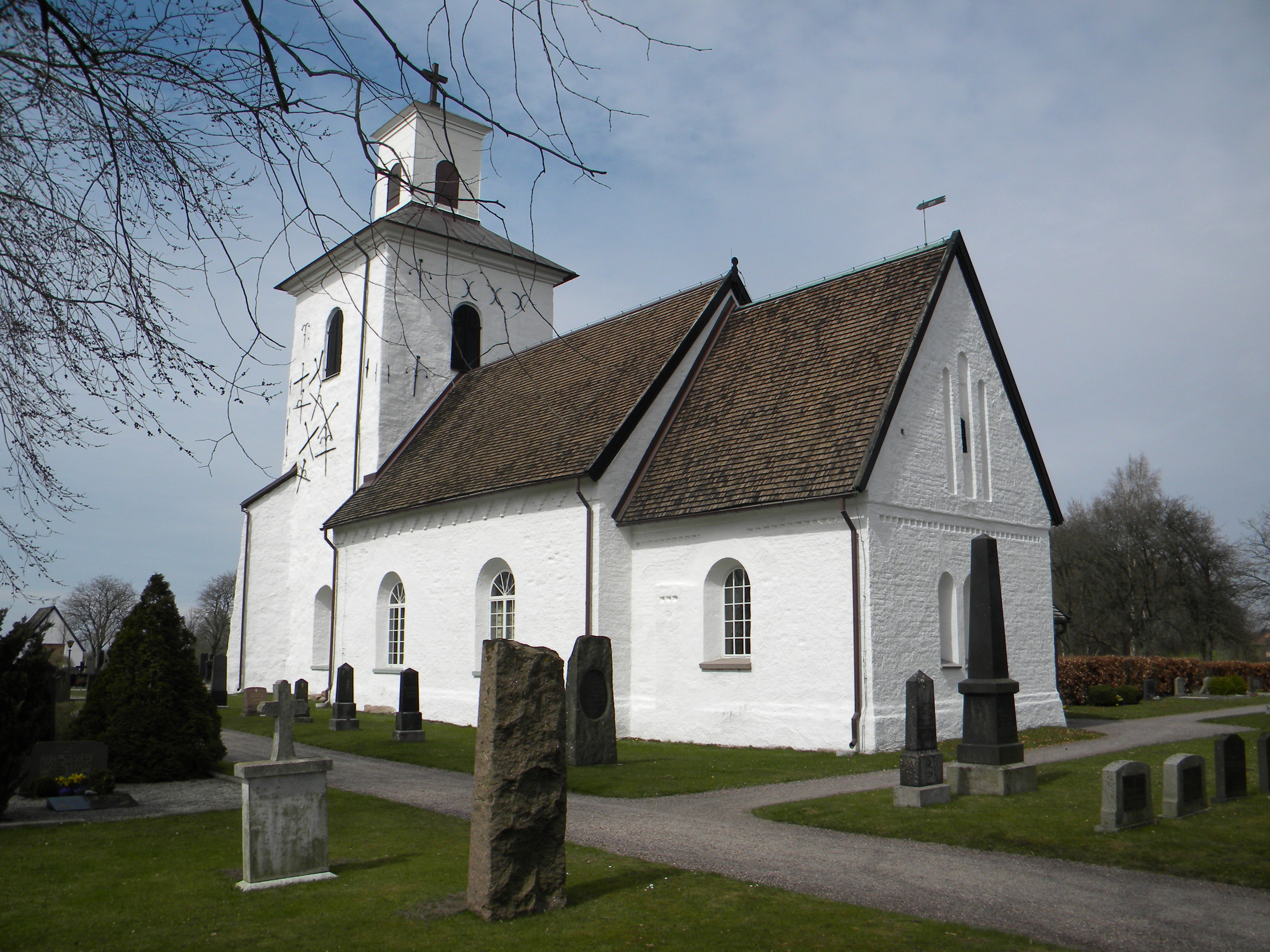 Ysby kyrka